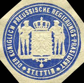 Sealing stamp Title: Der Königlich Preussische Regierungs - Präsident - Stettin Description: blau, weiß, geprägt Place: Stettin size: 3 cm